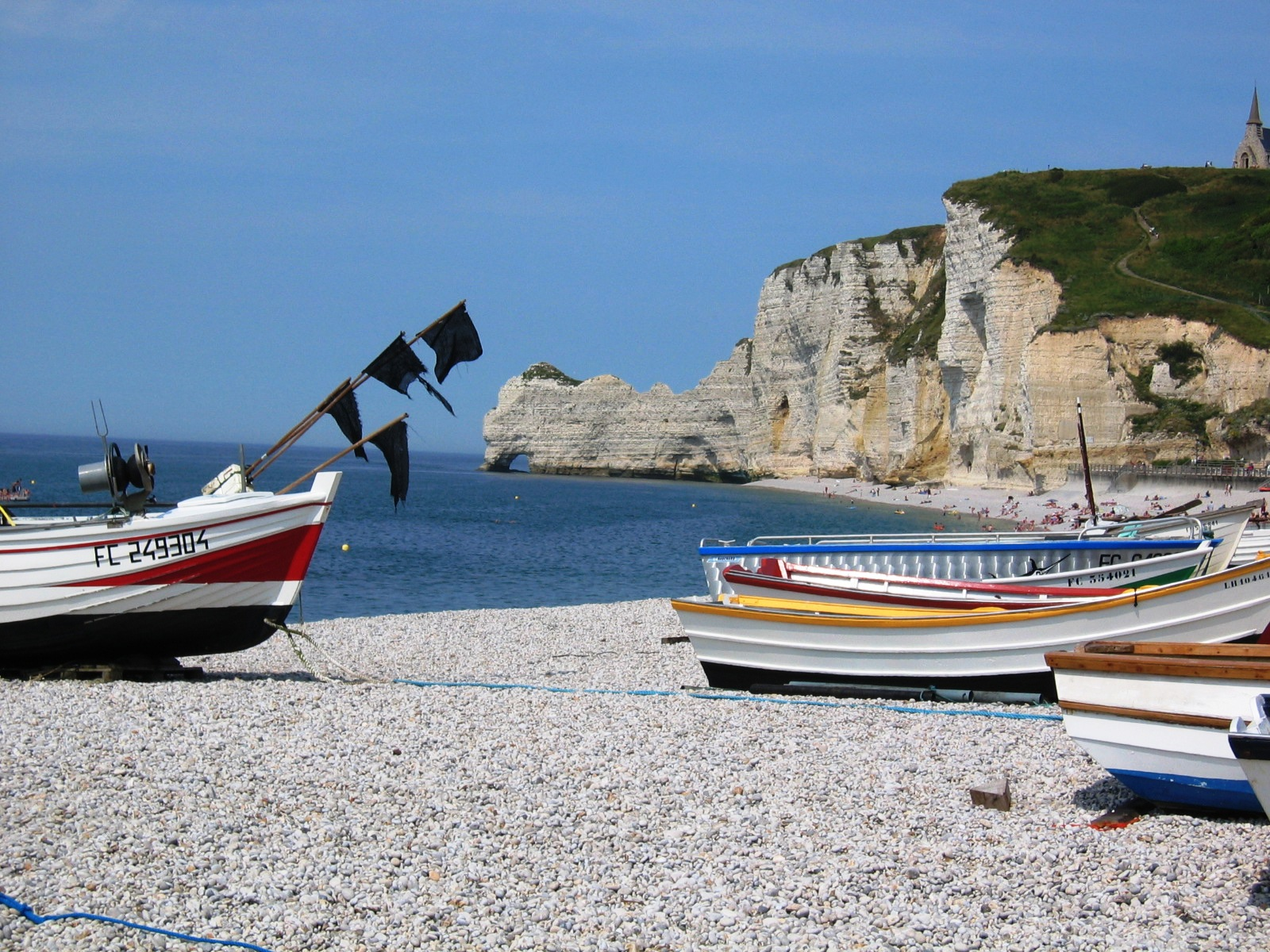 Die Bucht von Etretat (Normandie, Frankreich)